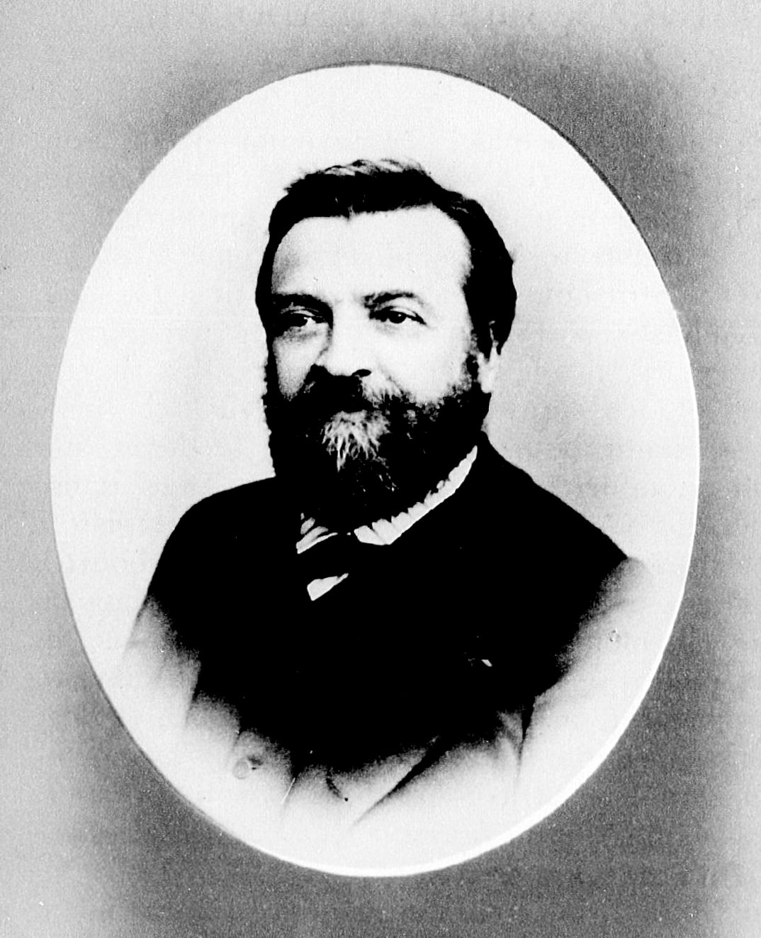 Gustave Brion, Biographies alsaciennes avec portraits en photographie, série 4